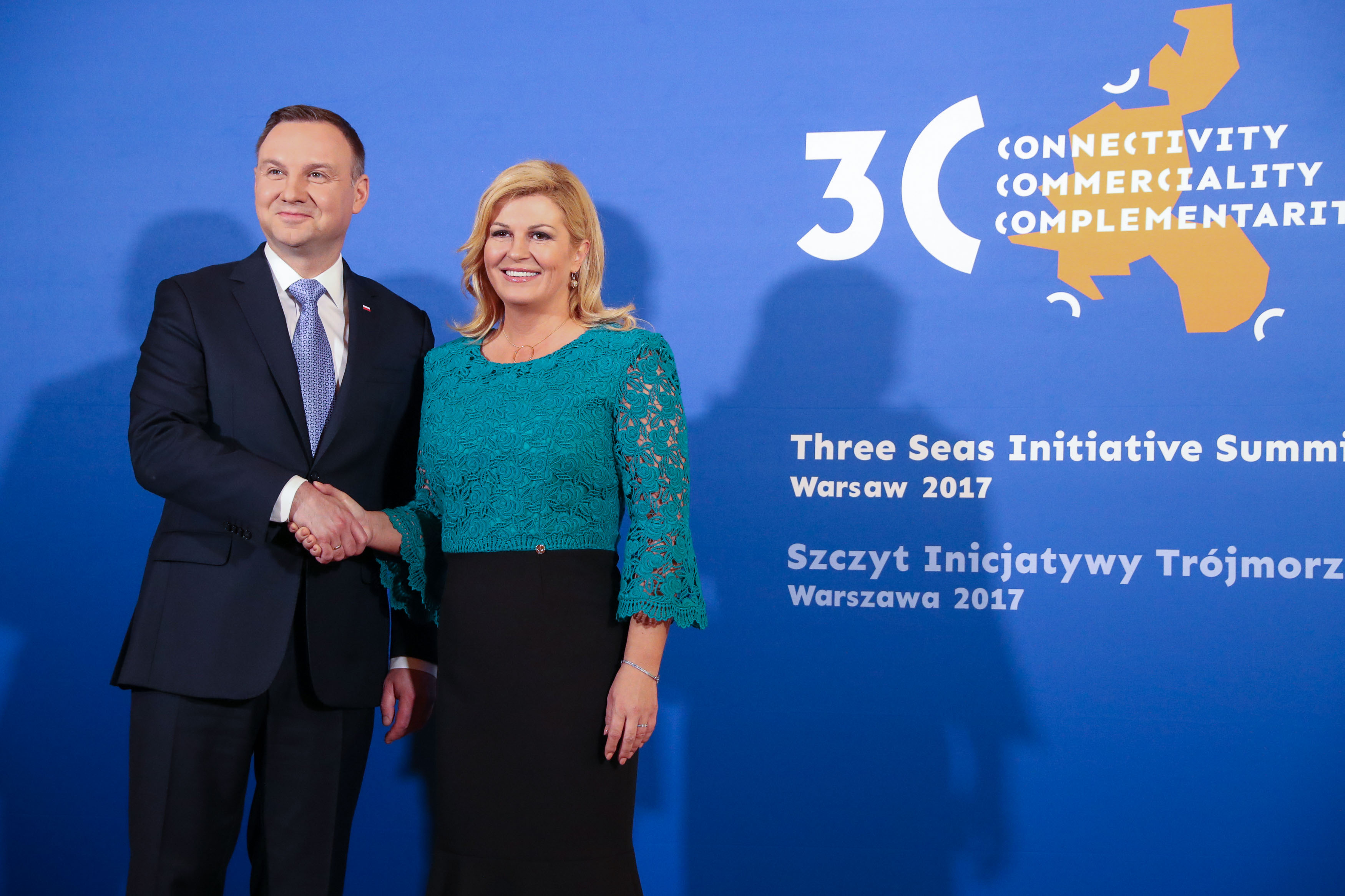 06/07/2017 Prezydenci Andrzej Duda i Kolinda Grabar-Kitarović na szczycie Inicjatywy Trójmorza. Fot. Krzysztof Sitkowski